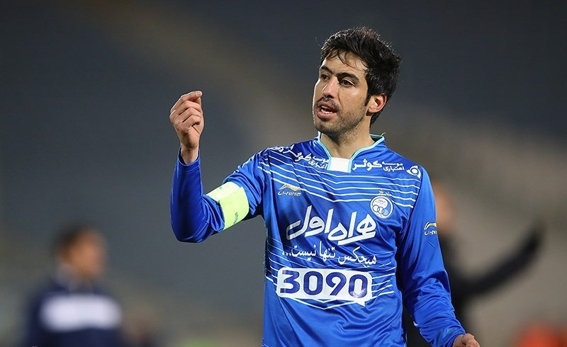 دیدار تیم های فوتبال استقلال تهران و استقلال خوزستان